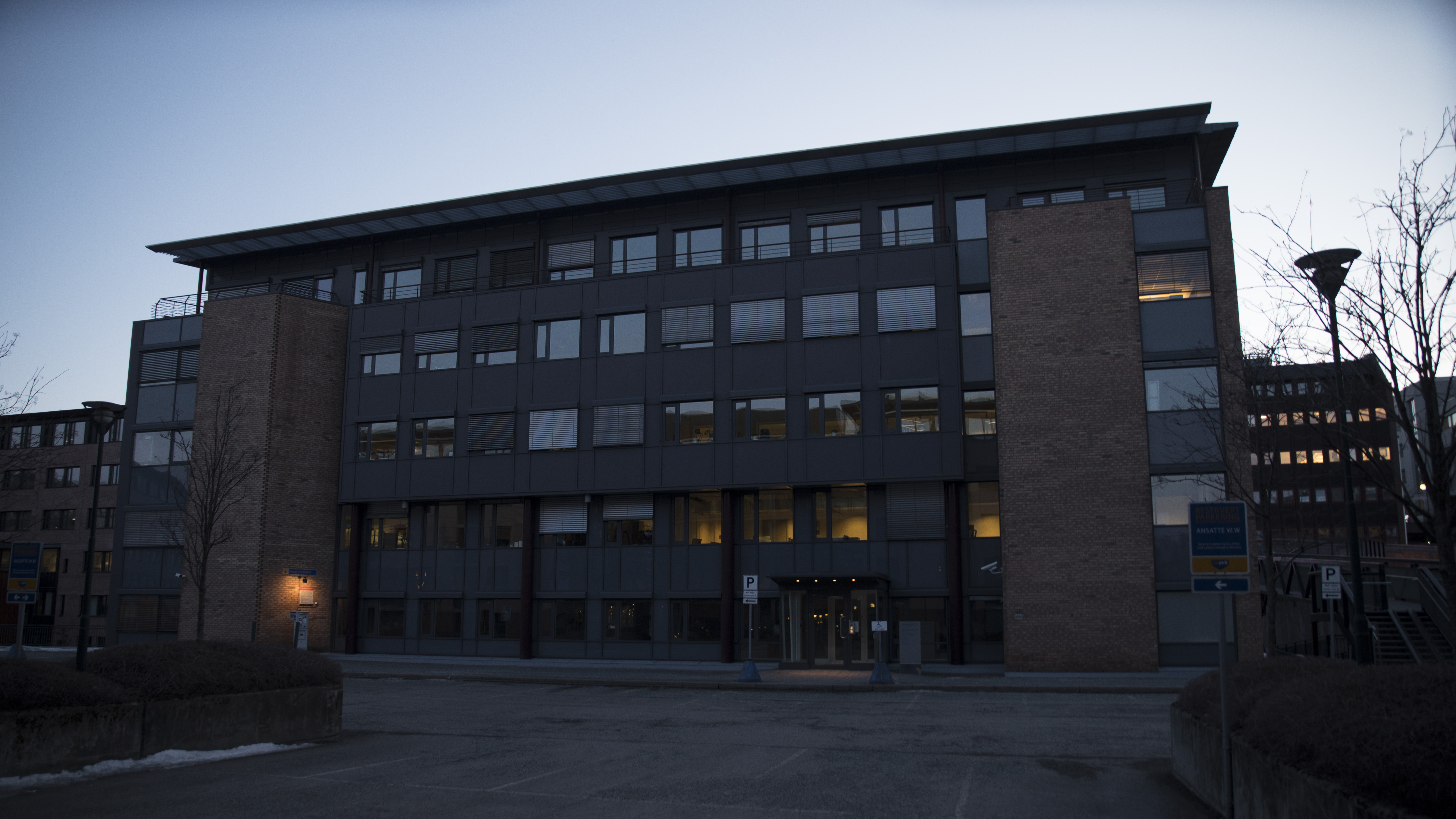 Unicus sitt kontor på Lysaker